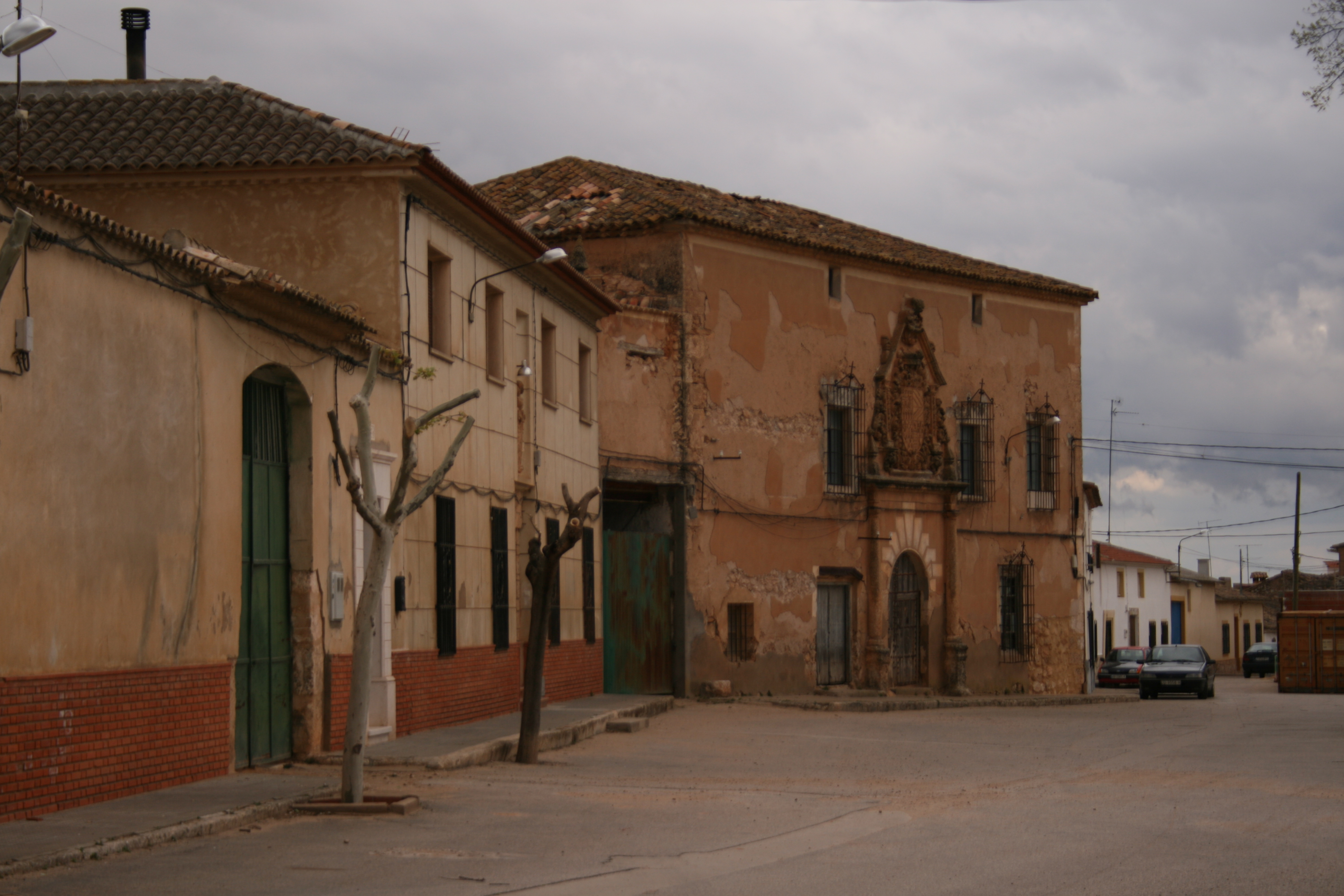 Pozoamargo, Casa Costillas